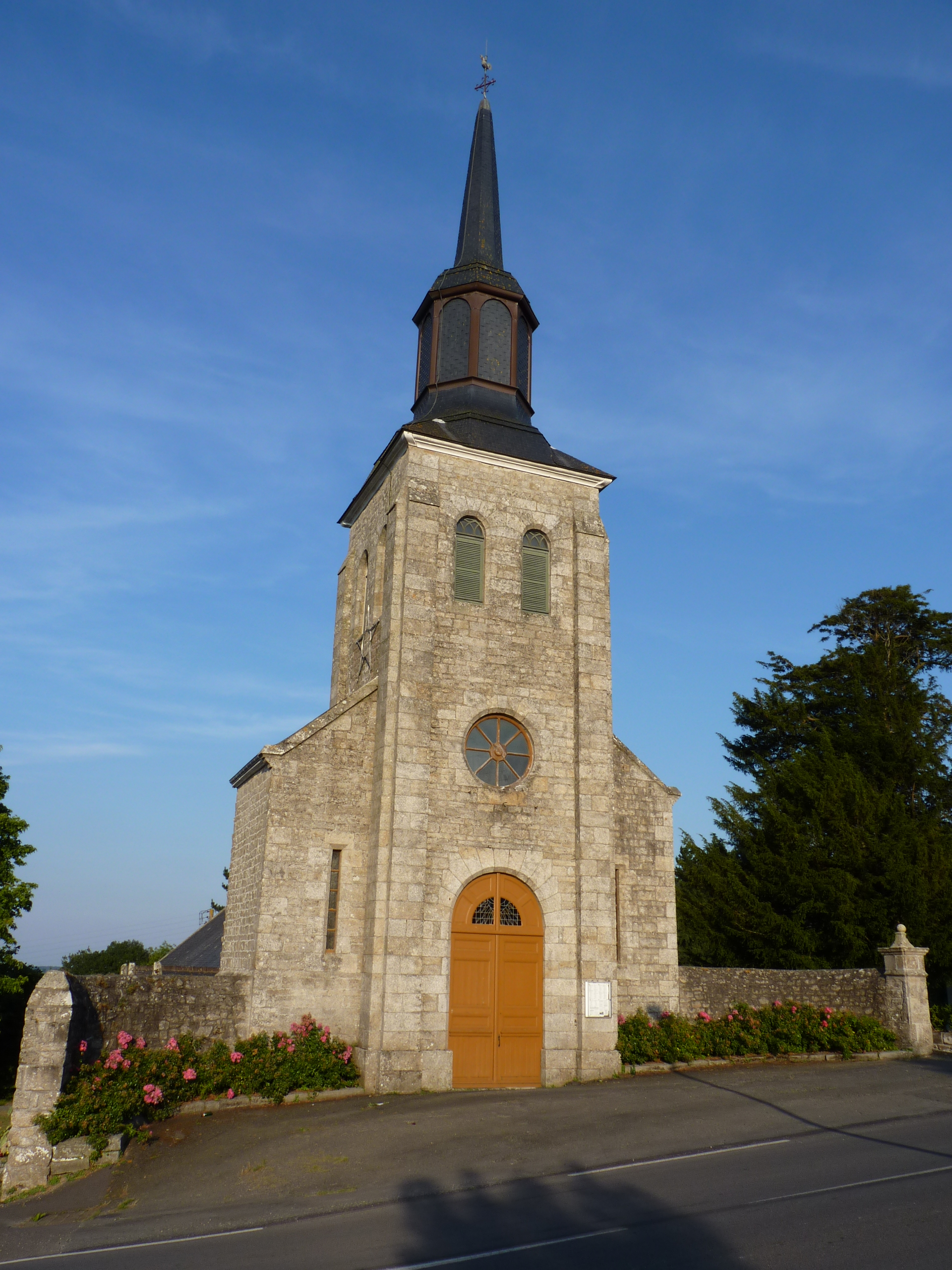 Église du 16ème siècle